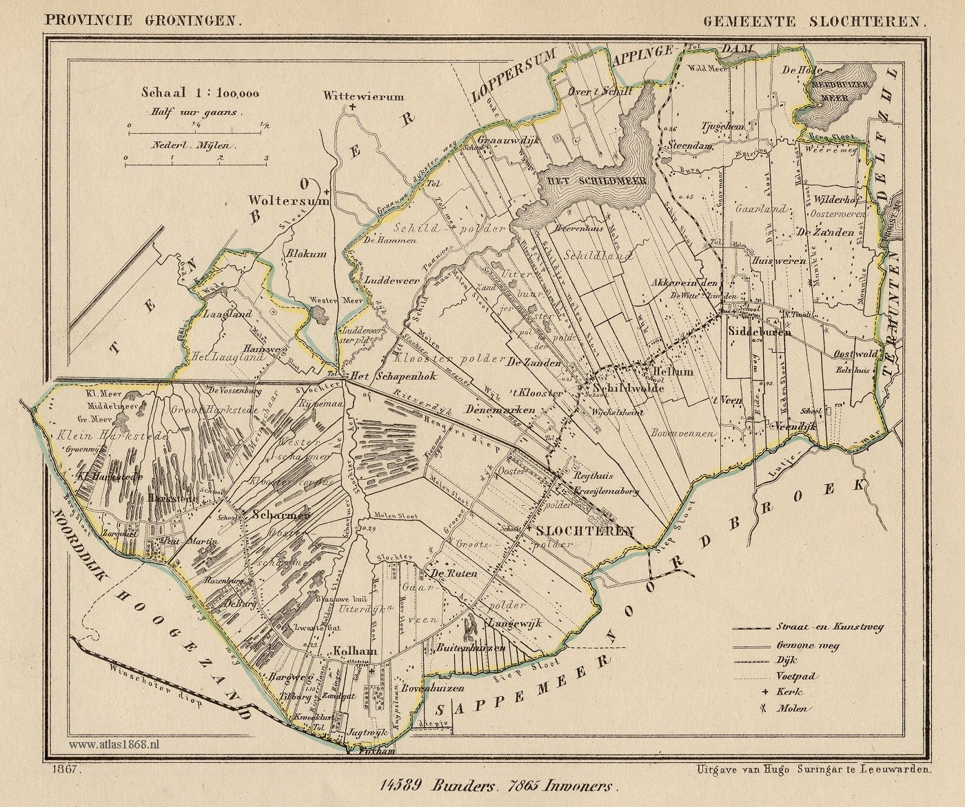 Kaart van Slochteren uit Gemeente Atlas van Nederland